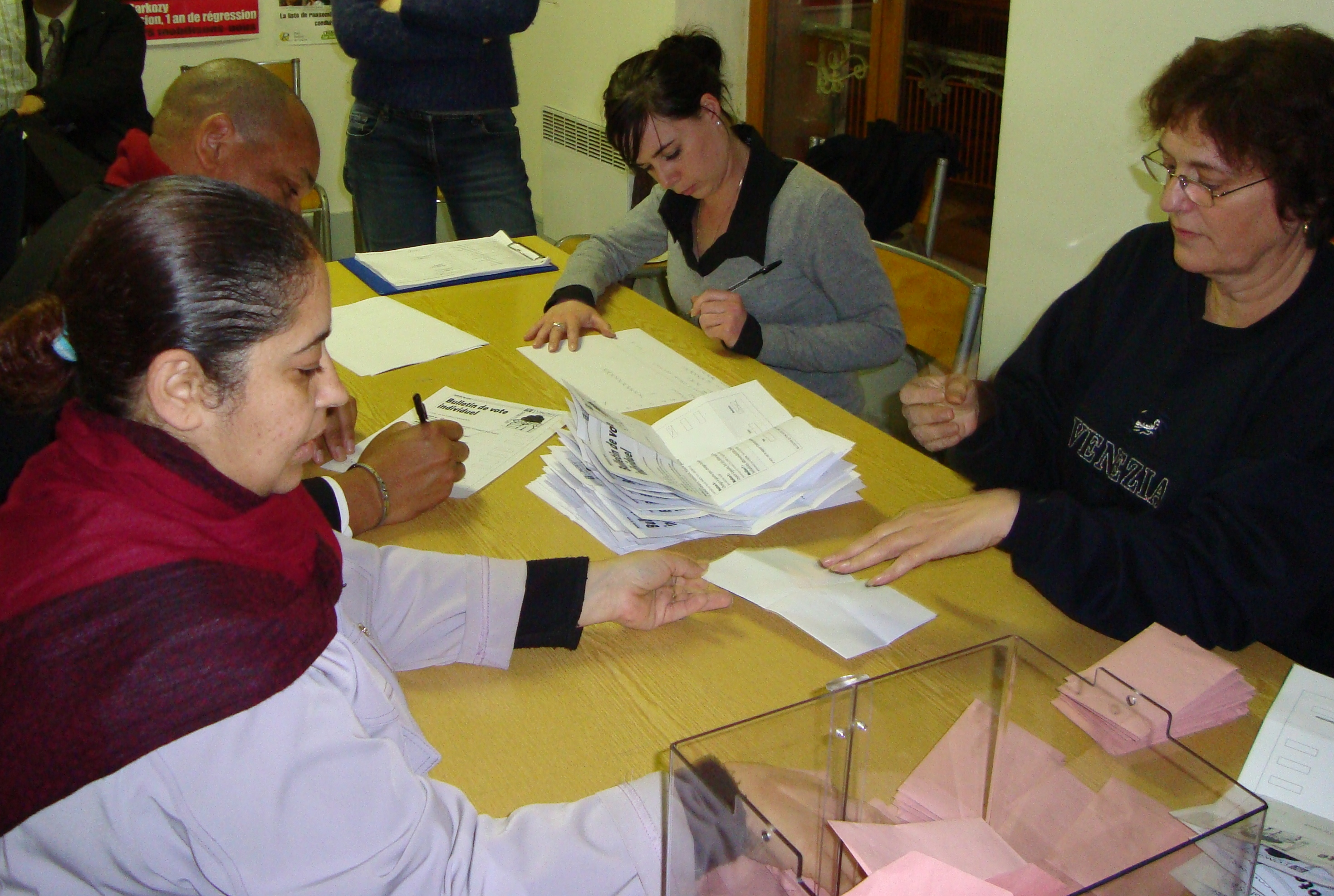 Dépouillement des votes du Congrès du PS le 6 novembre 208 à La Courneuve (France).